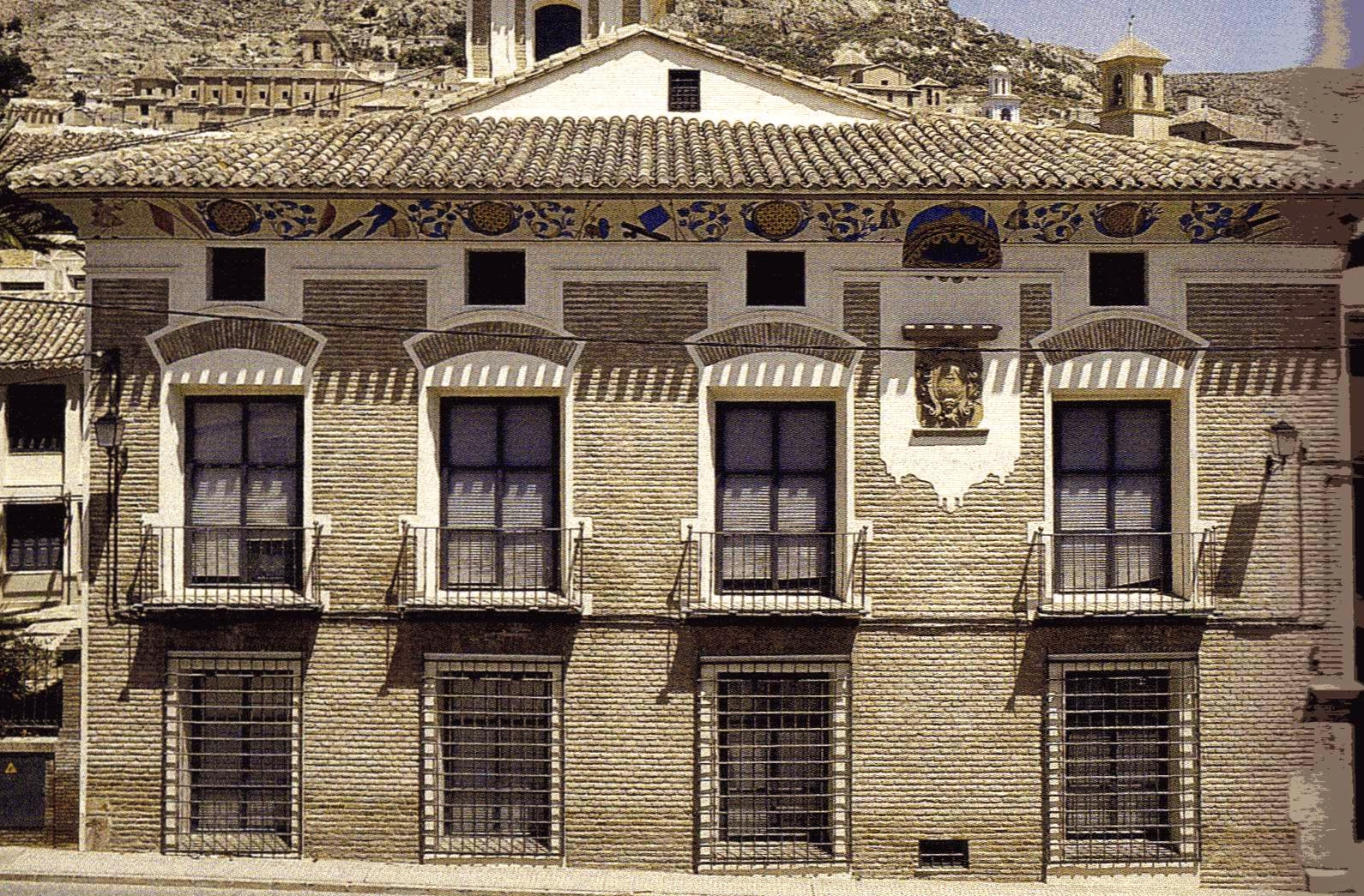 Palacio de Menahermosa rehabilitado. Convertido en sede del nuevo museo de El Cigarralejo. Años ´90.